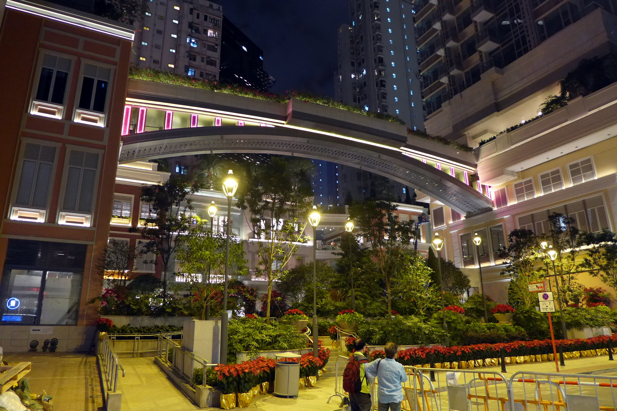 Lee Tung Avenue